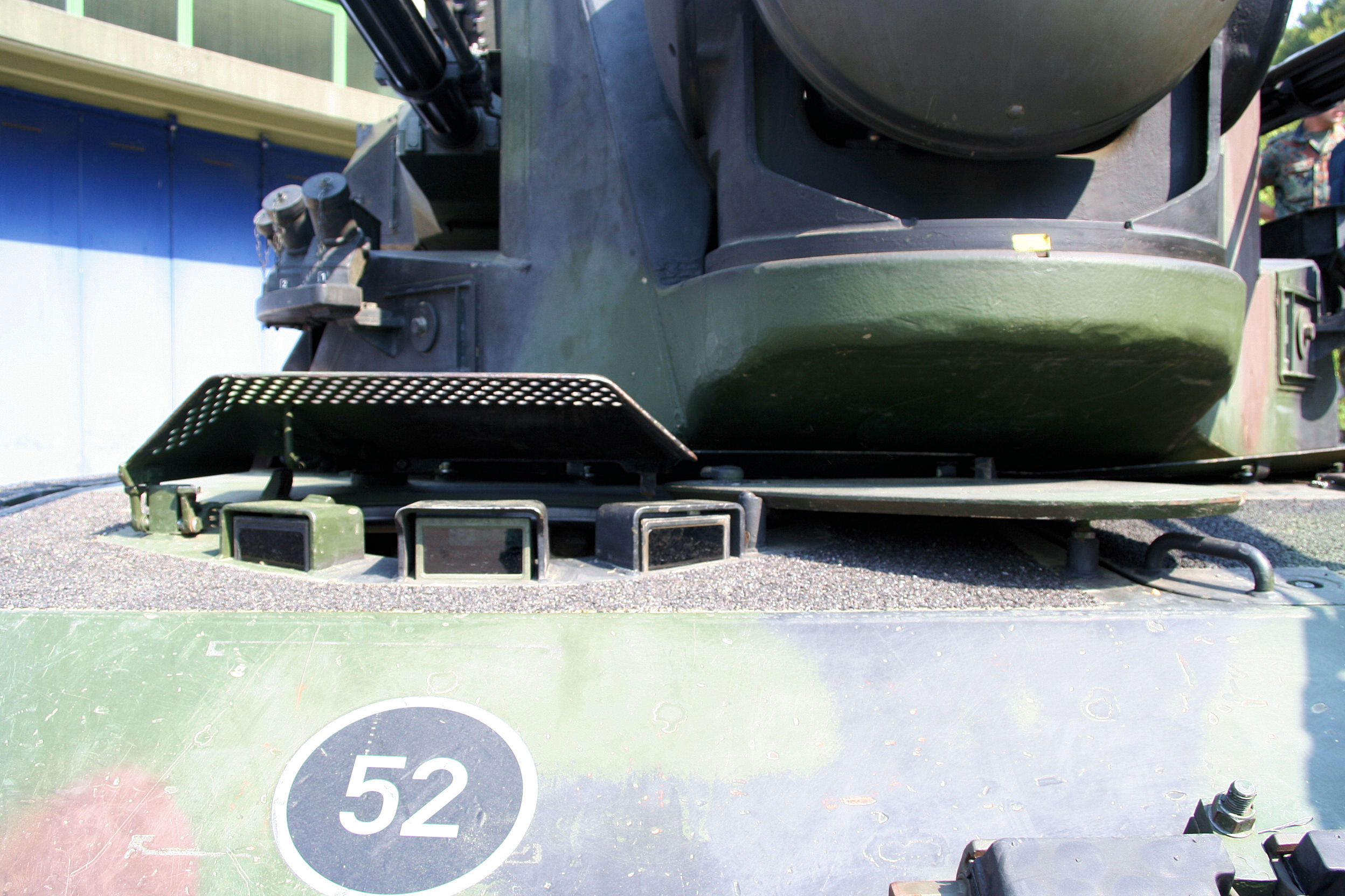 Gepard 1A2 Fahrer1 Gepard 1A2 Driver1